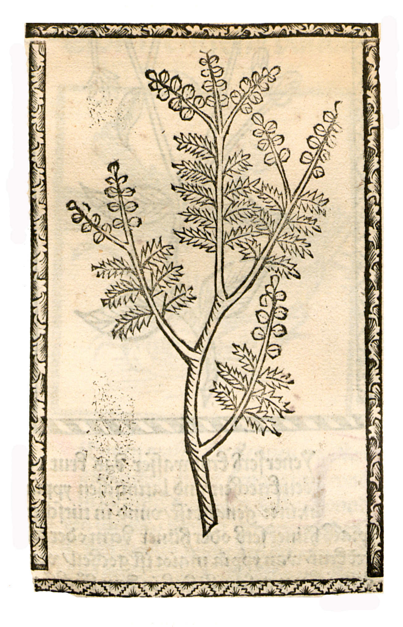 Abbildung von Heid (Calluna vulgaris)